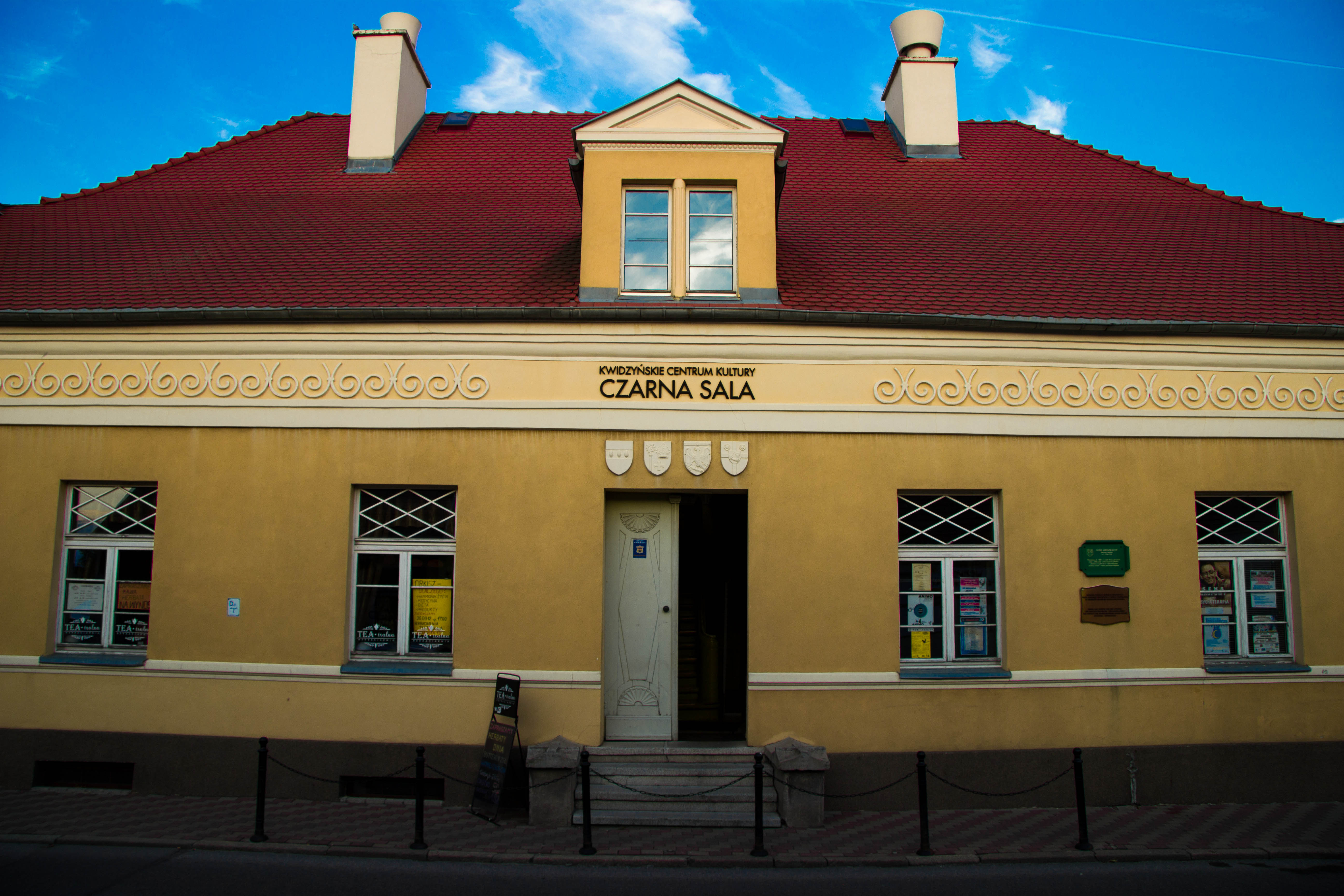 Kwidzyn, ul. Słowiańska 13 - dom, obecnie Kwidzyńskie Centrum Kultury "Czarna Sala", 1 poł. XIX